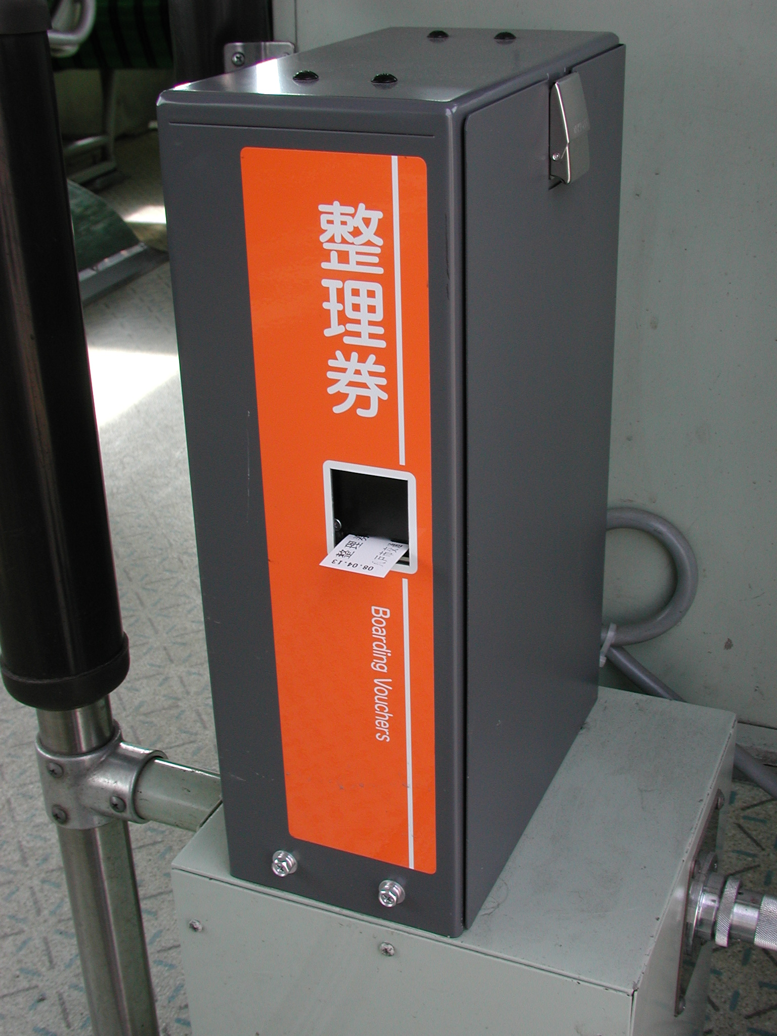 レシップ製 感熱紙式整理券発行機（LTM01型） 八戸市営バス車内にて。